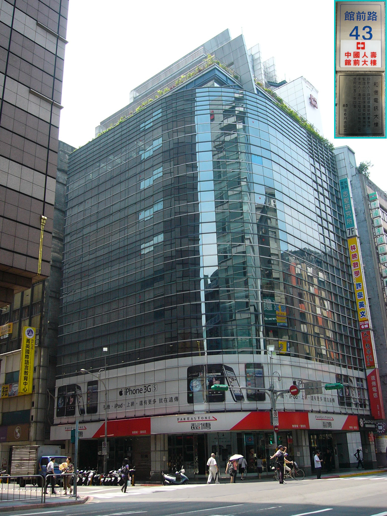 和信電訊大樓，位於臺北市中正區館前路43號，在和信電訊消滅後改名為中國人壽館前大樓。1樓是遠傳電信無限城館前店。